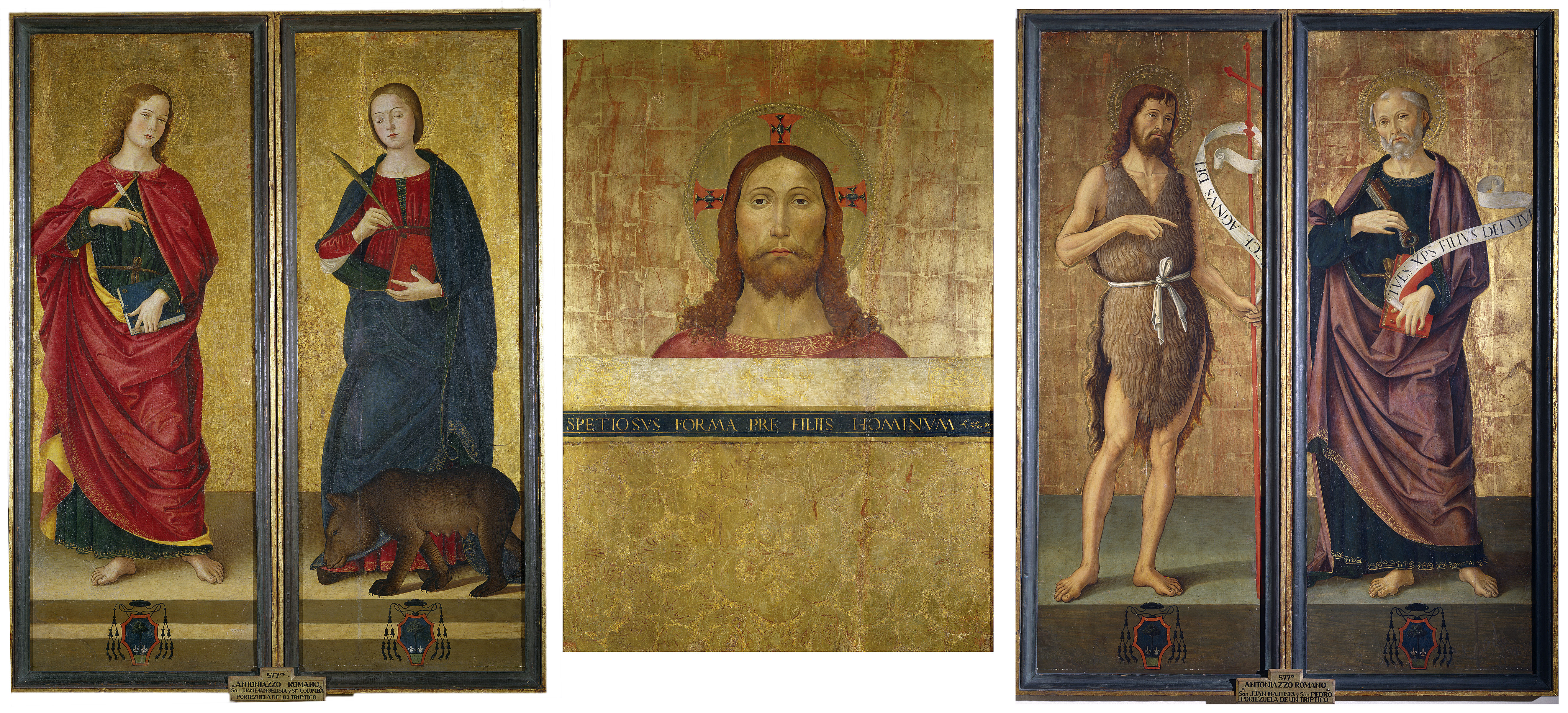 La tabla central representa a Jesucristo, en las dos tablas de la izquierda aparecen San Juan Evangelista y Santa Columba de Sens, y en las dos de la derecha San Juan Bautista y San Pedro Apóstol.